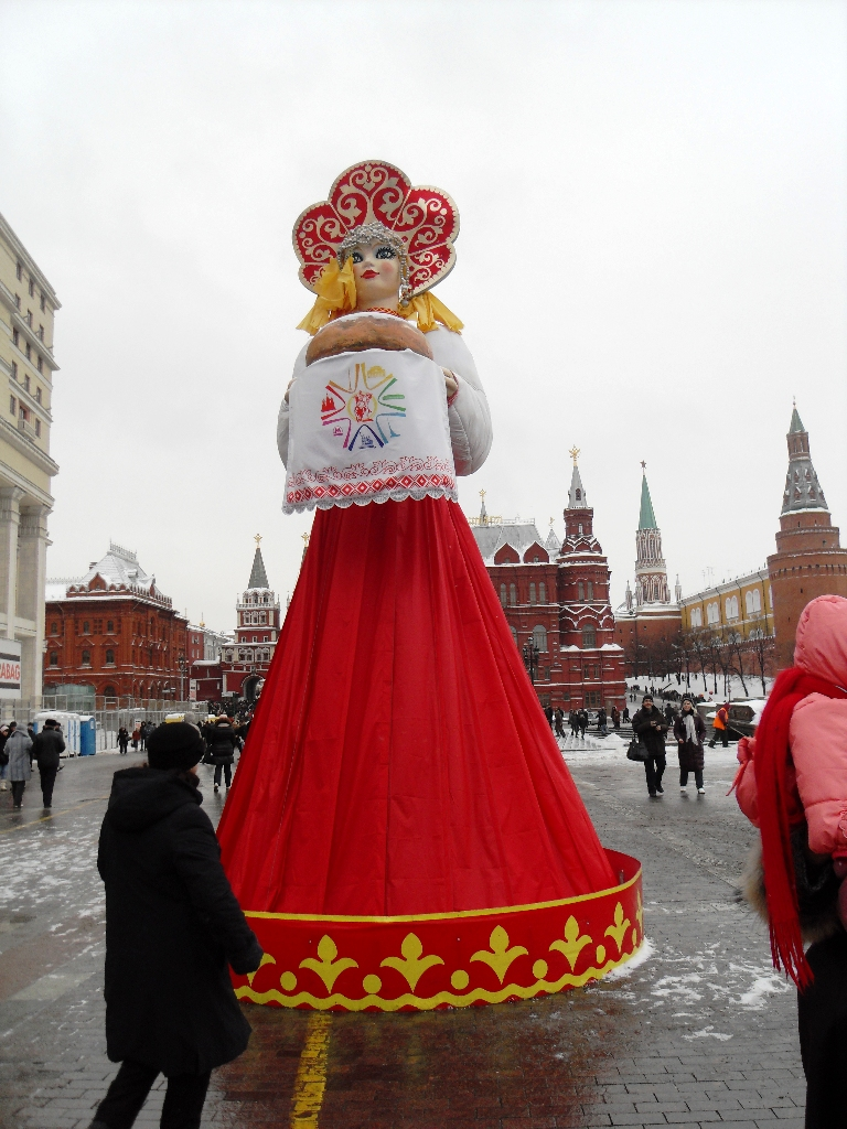 Фигура Масленицы на Манежной площади в Москве